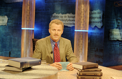 Peter R. de Vries in zijn televisieprogramma Peter R. de Vries, misdaadverslaggever